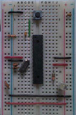 브레드보드 아두이노 ATmega328P 연결 모양